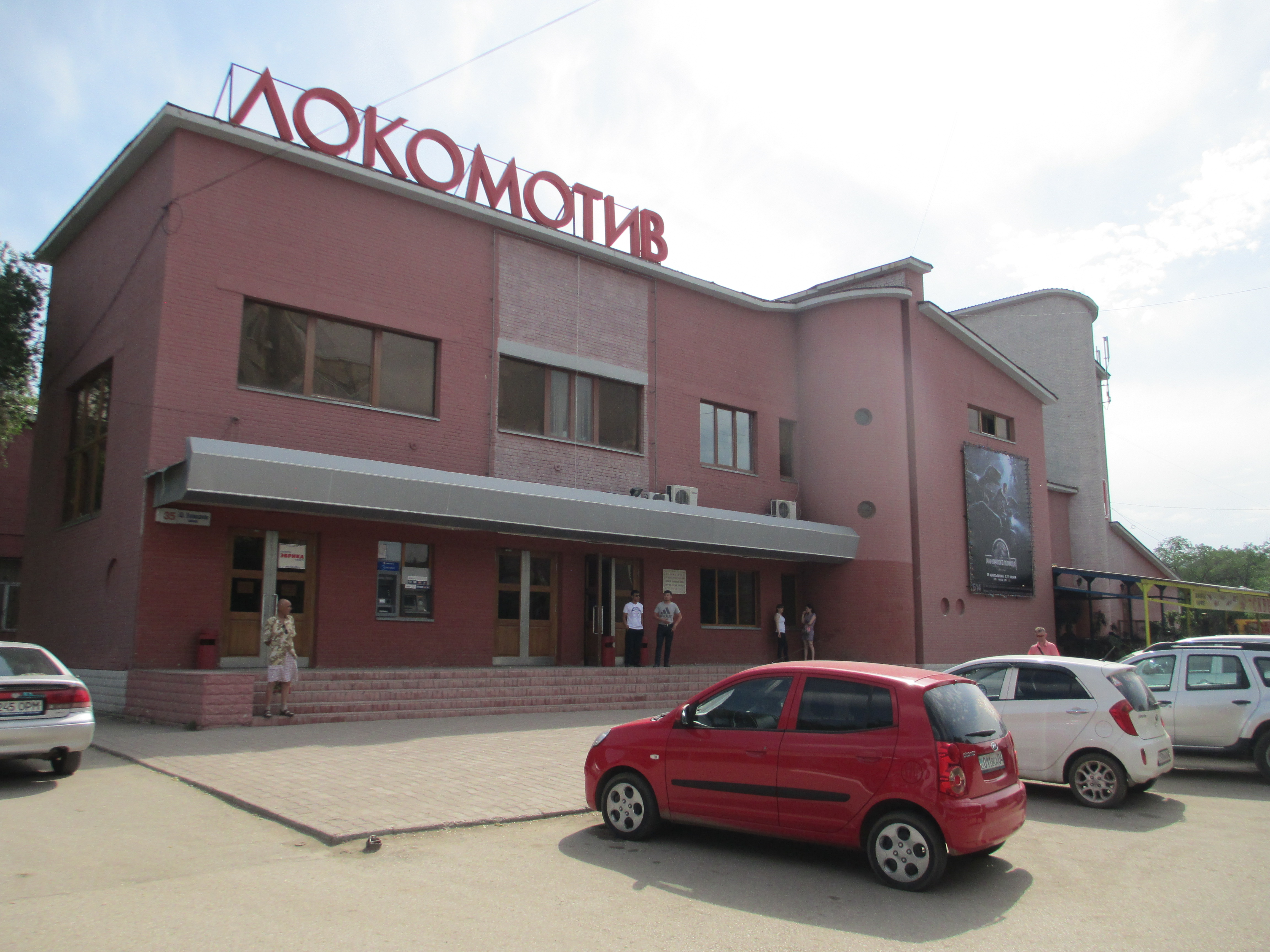 Кинотеатр «Локомотив» в Актобе, построенный в 1928 году — входит в число памятников истории и культуры Казахстана республиканского значения.